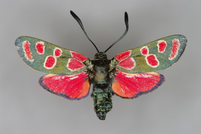 Zygaena (Agrumenia) carniolica, Weibchen